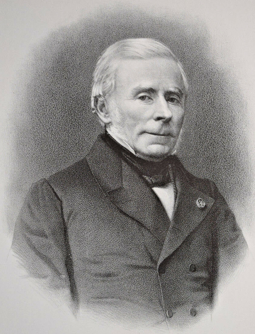 Lithographie de Charles Lucas, Saint-Brieuc, prison